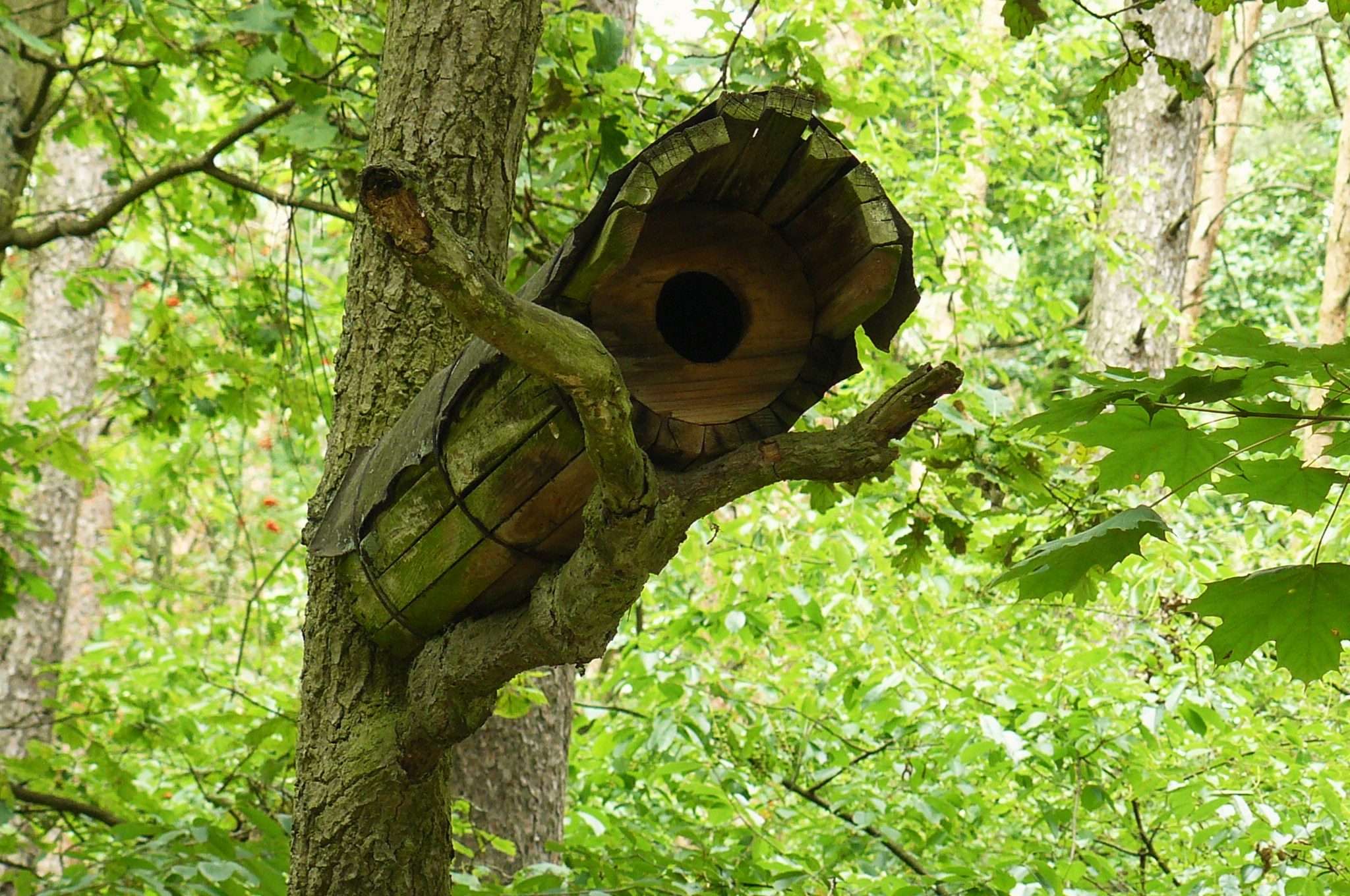 Domek dla sowy pójdźki w Gołuchowie.